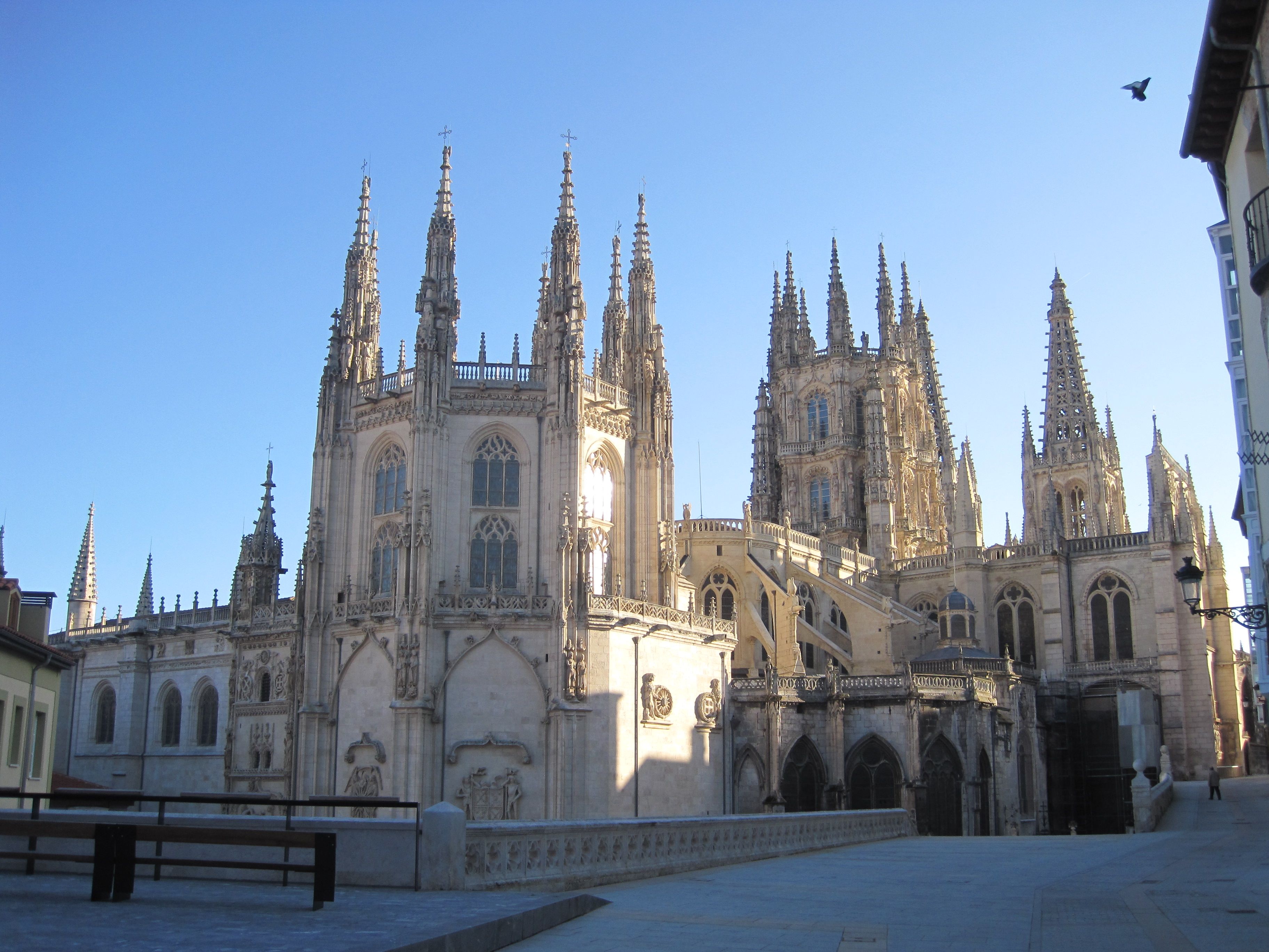 Vista trasera de la catedral de Burgos desde la calle Fernán González.